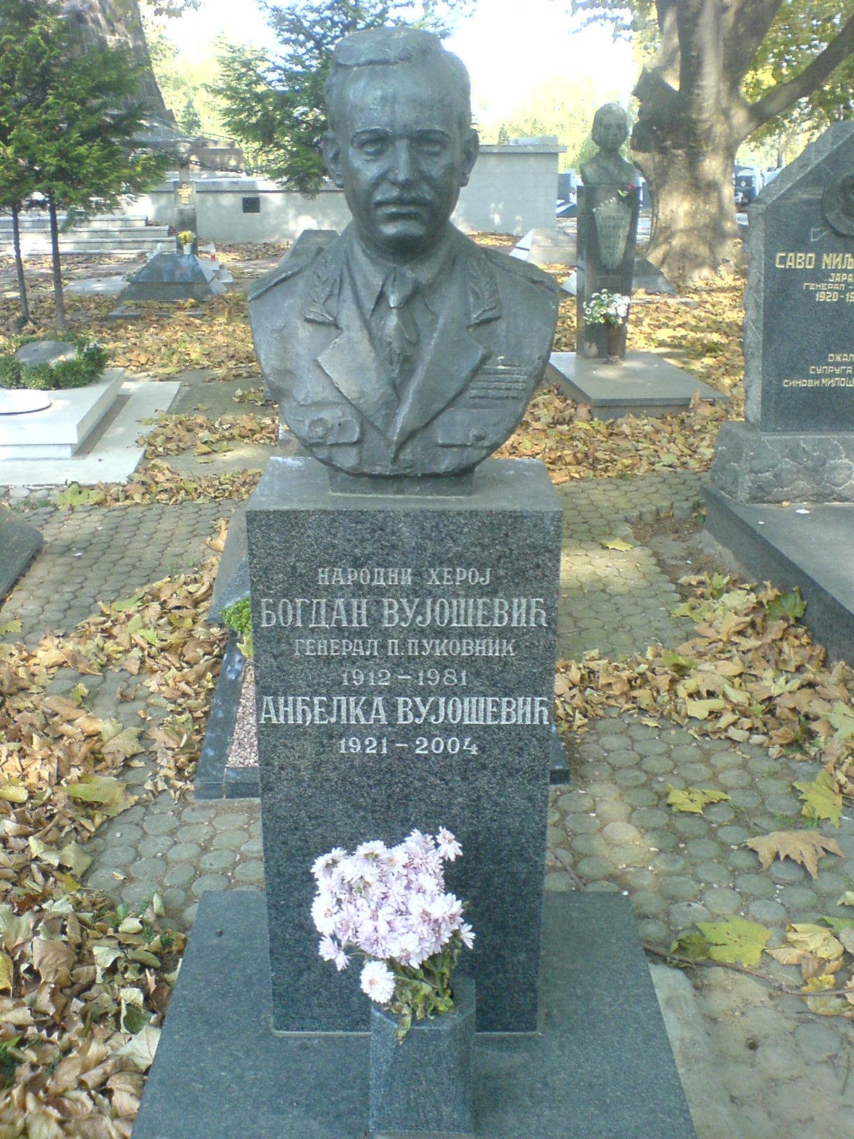 Grob Bogdana Vujoševića.